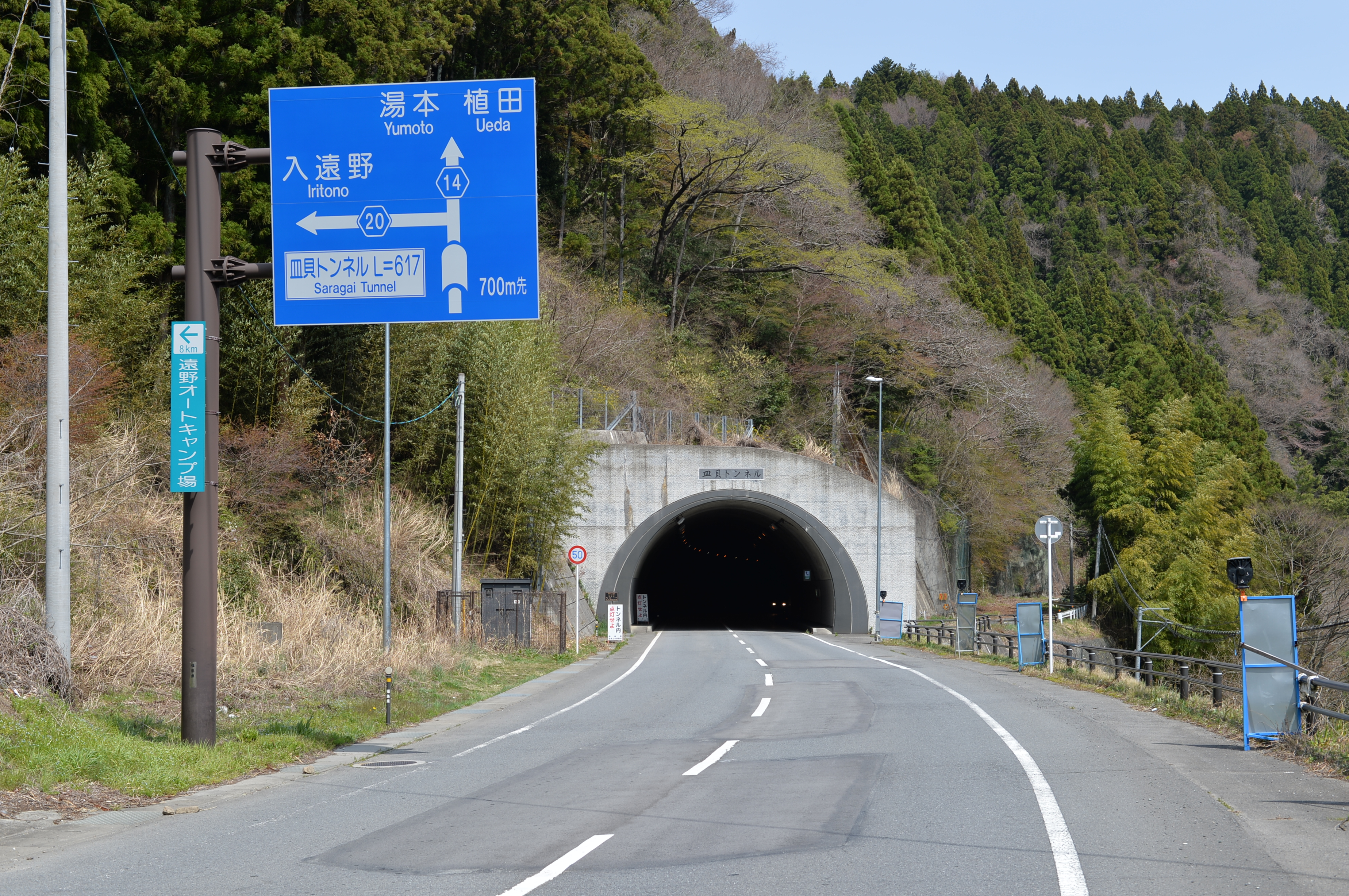 皿貝トンネル（福島県道14号いわき石川線）